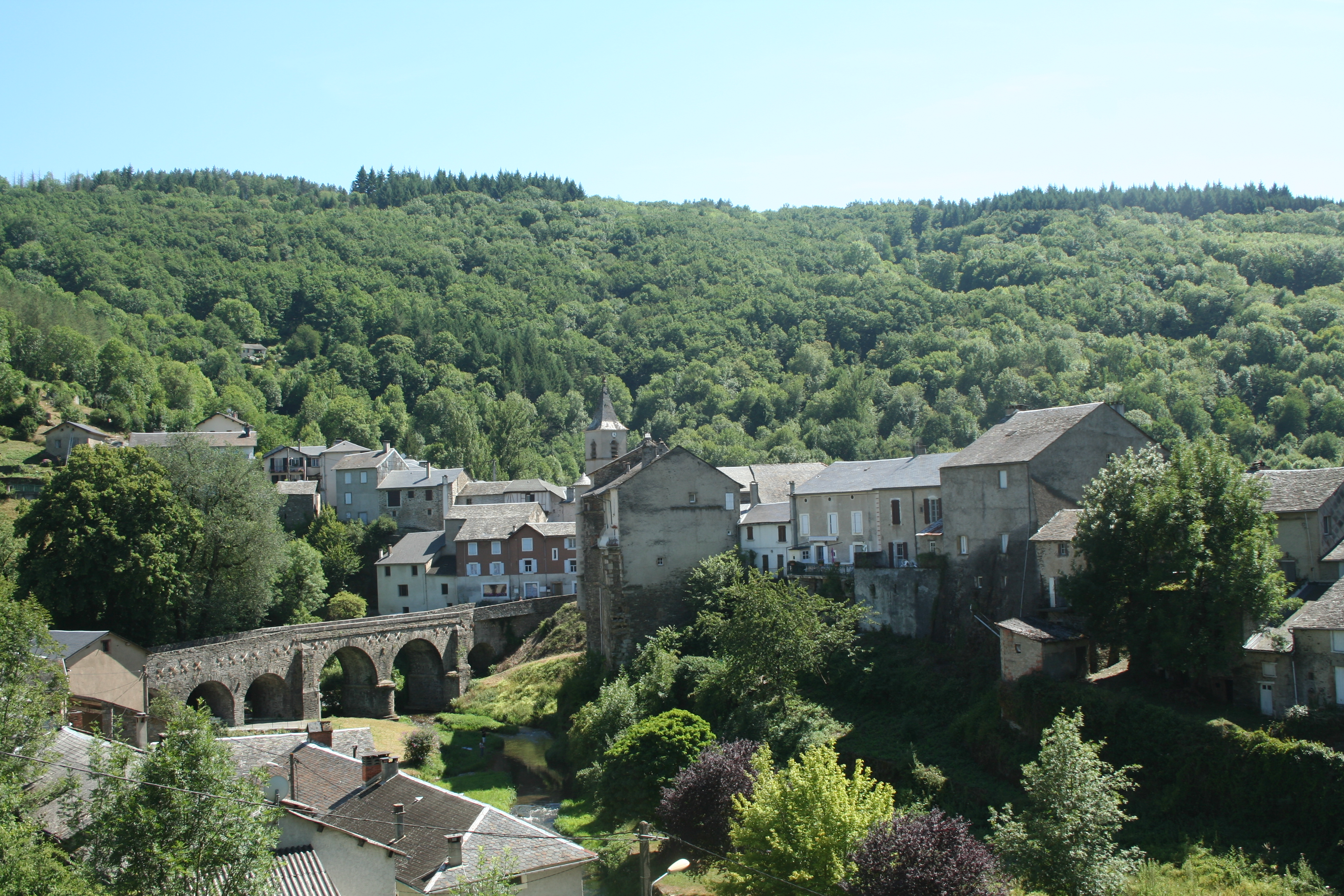 Lacaze (Tarn) - vue générale.